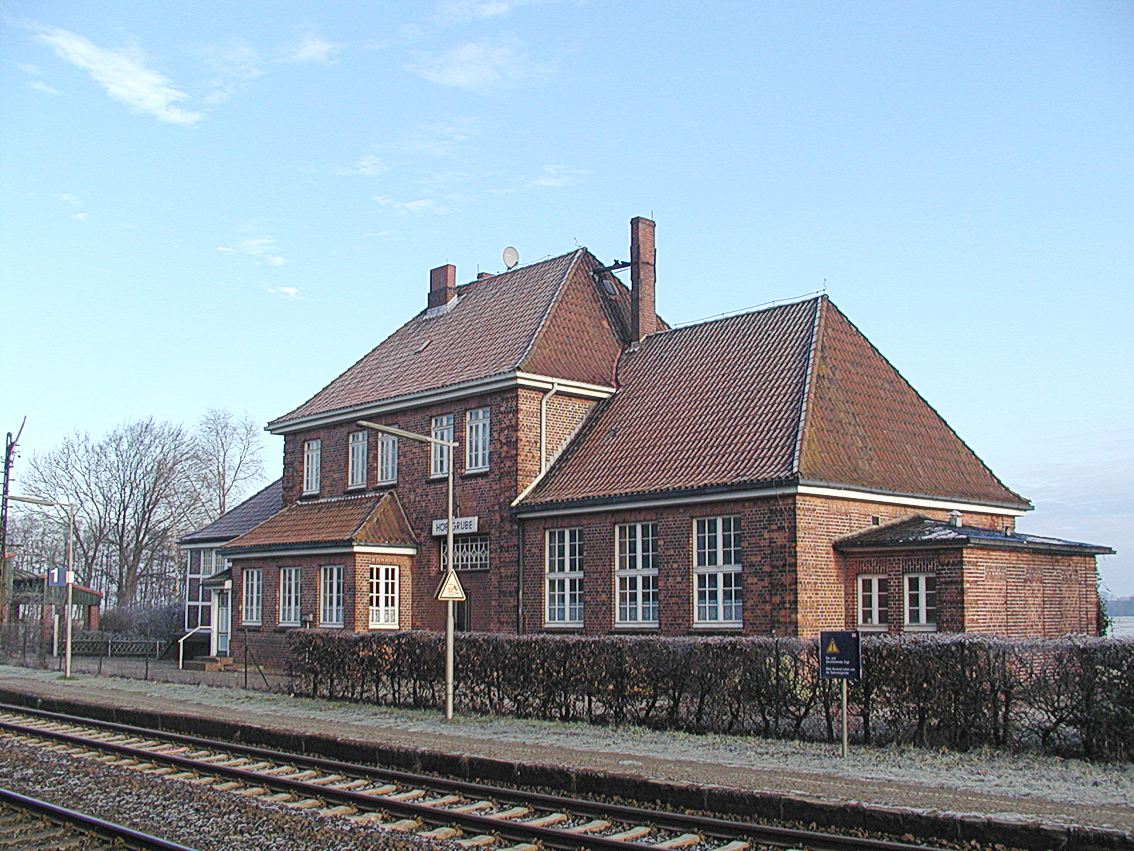 Der Wingster Bahnhof Hofgrube in Winter